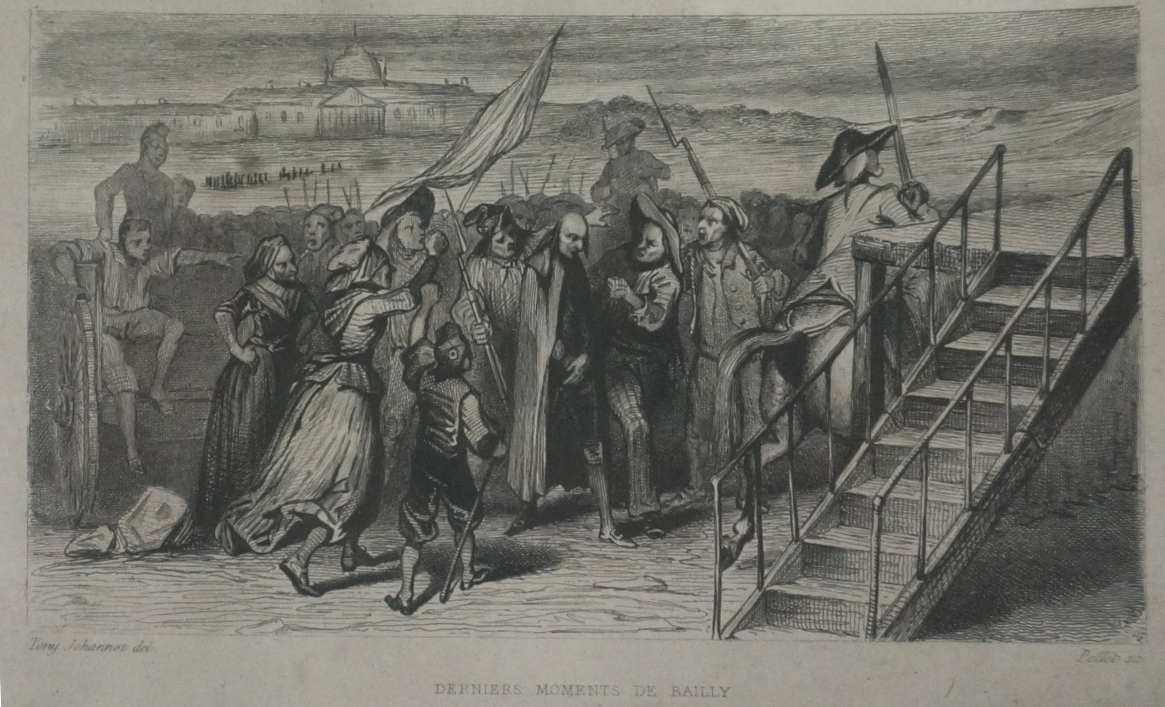 L'ancien maire de Paris, Bailly, conduit à l'échafaud.